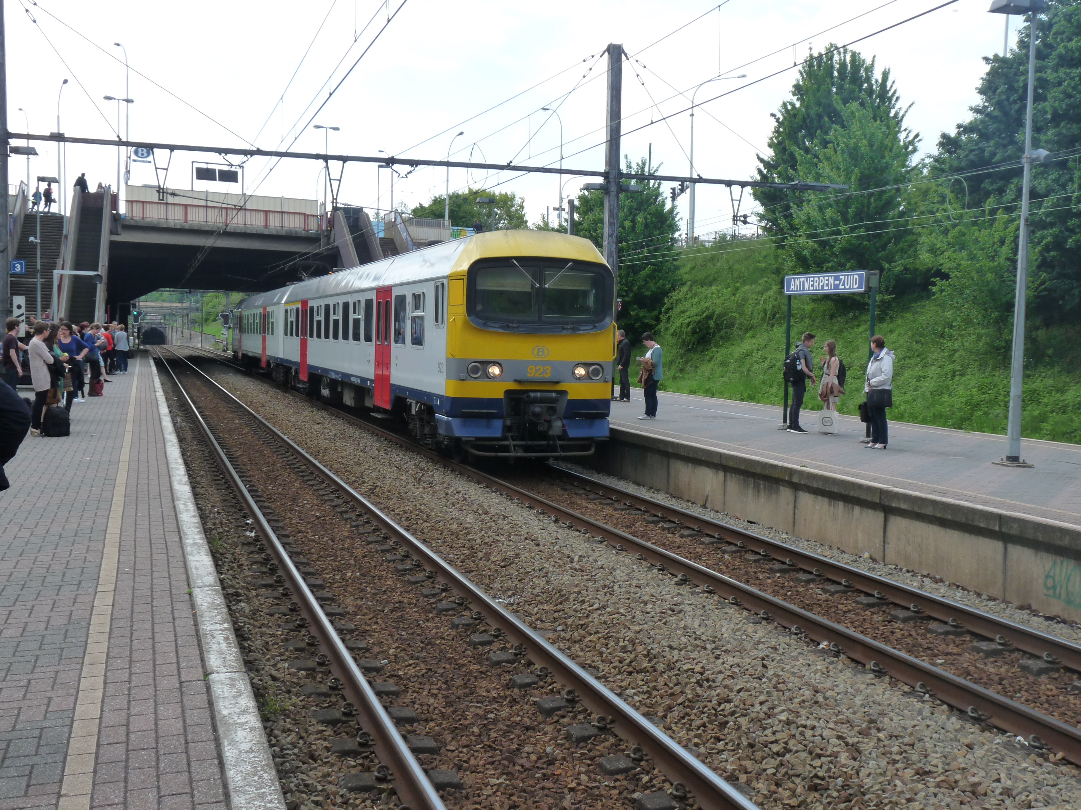 Antwerpen Zuid met stoptrein naar Antwerpen C